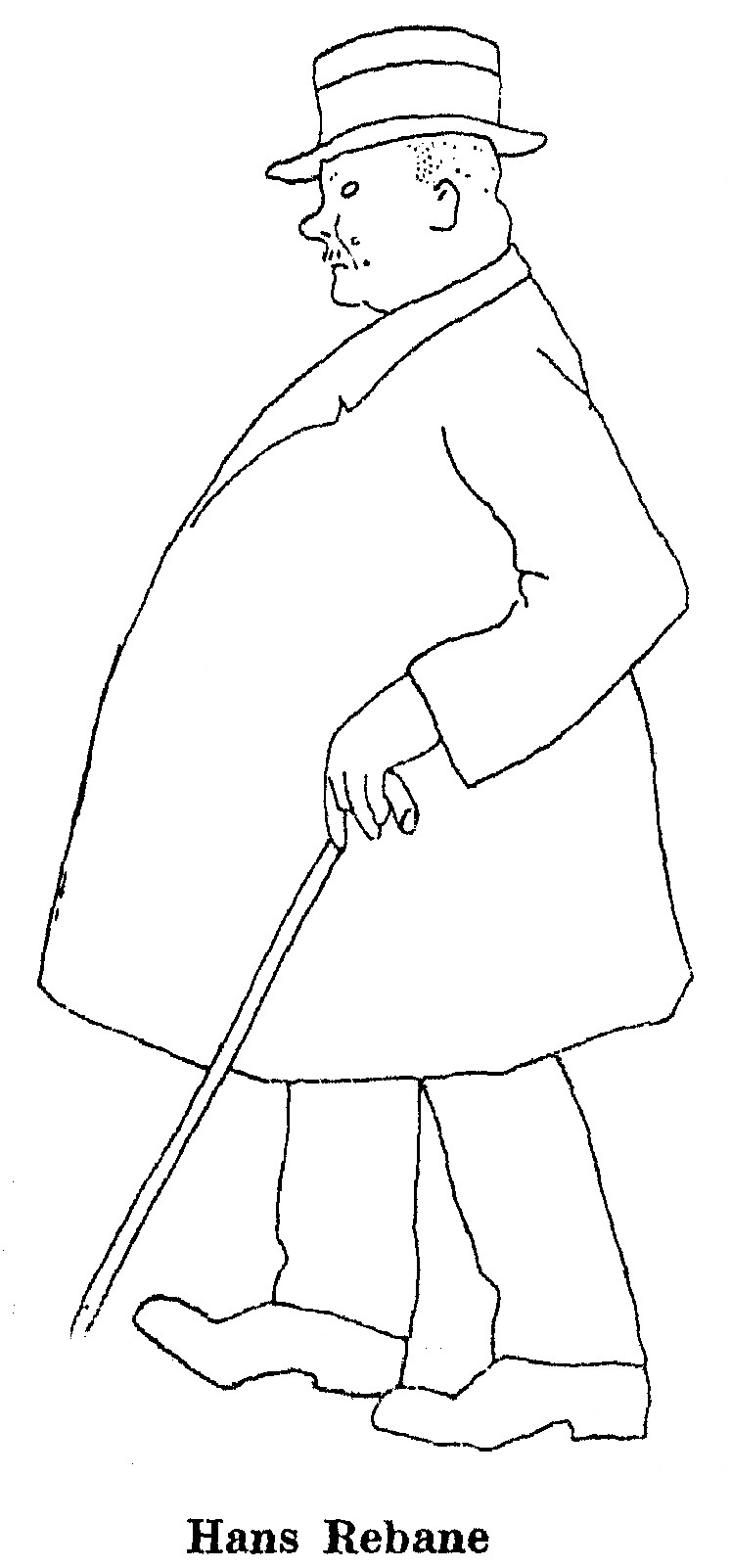 Karl August Hindrey šarž Hans Rebanesest